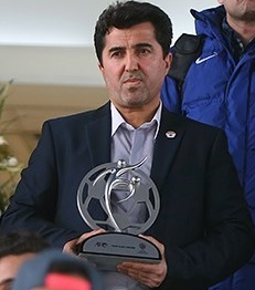 بازگشت تیم ملی فوتسال پس از قهرمانی در جام ملت های آسیا